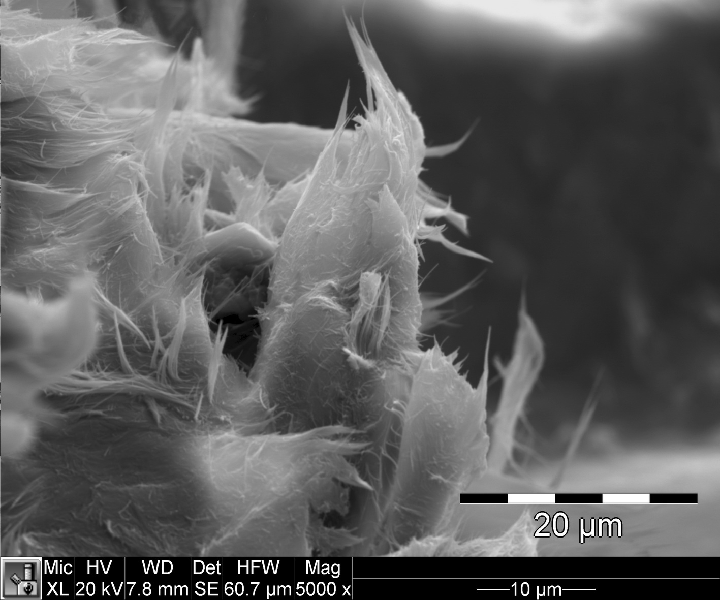 Rasterelektronenmikroskopische Aufnahme von Asbestfasern (Chrysotil) in Bitumen